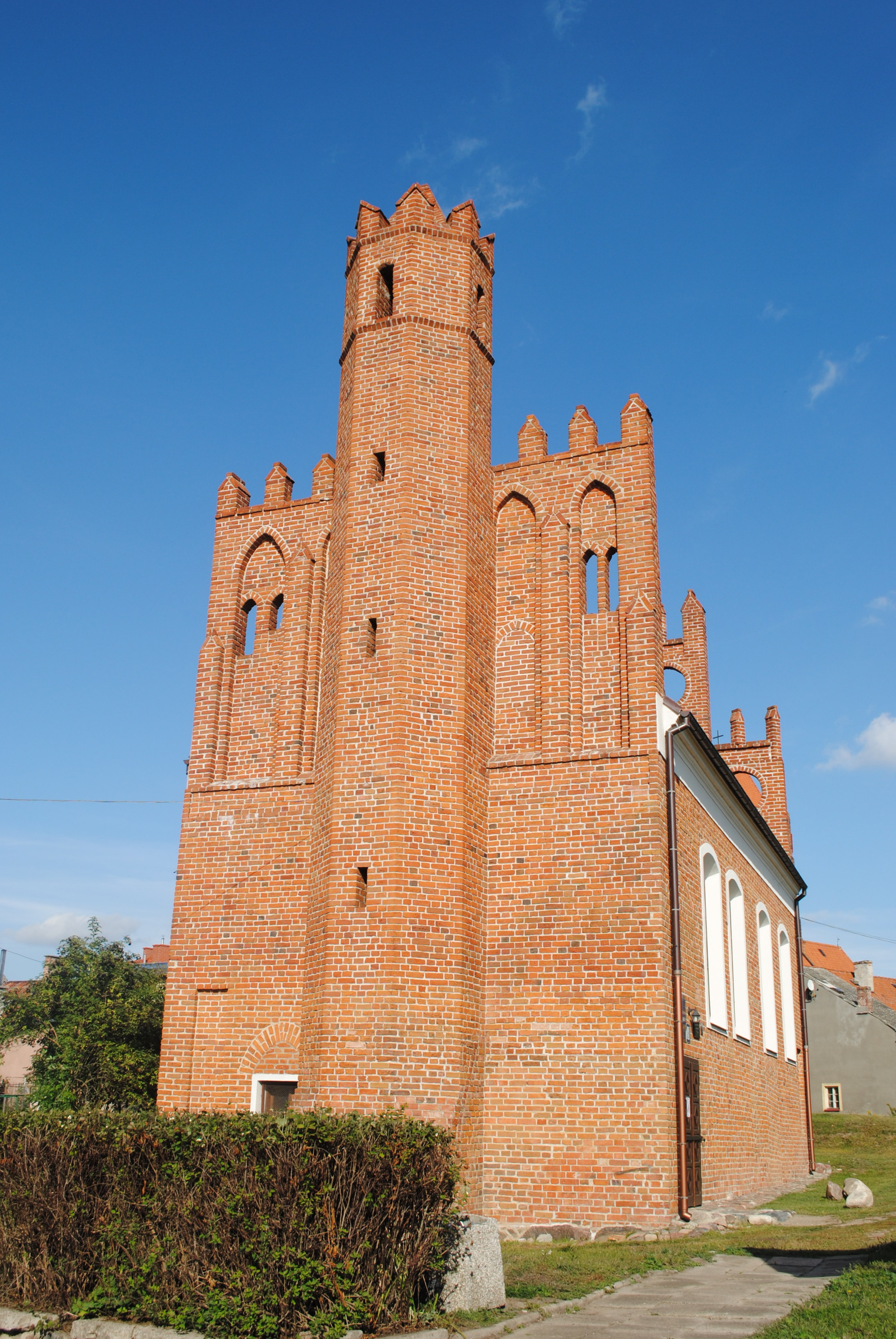 Prabuty, kościół "polski", ob. punkt muzealny, 1378-1409, 1723, 1871